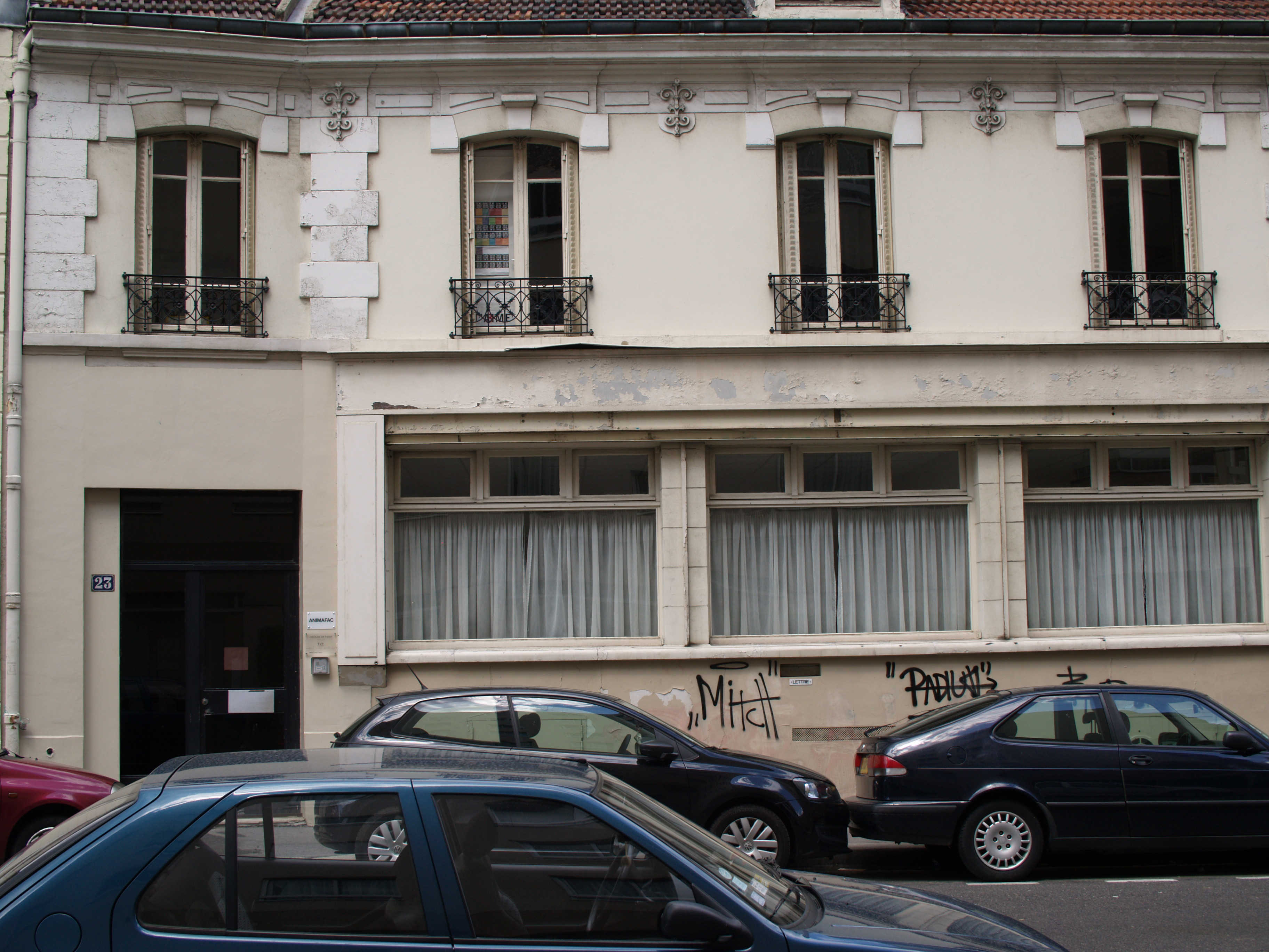 Le siège d'Animafac à Paris (France)